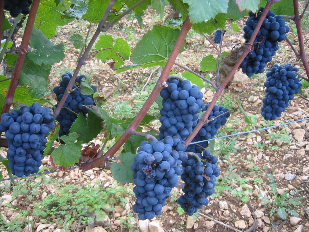 Cépage Pinot noir du vignoble de Bourgogne